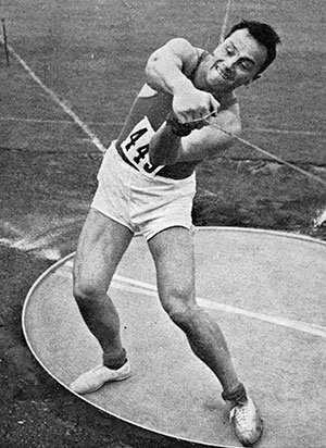 Birger Asplund